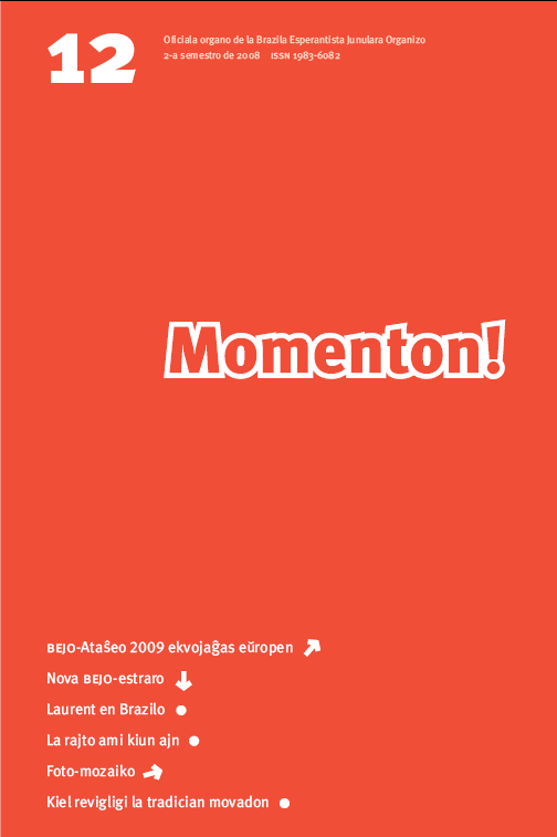 Temas pri la kovrilo de la 12-a eldono de la bulteno de BEJO (Brazila Esperantista Junulara Organizo), Momenton. ISSN 1983-6082